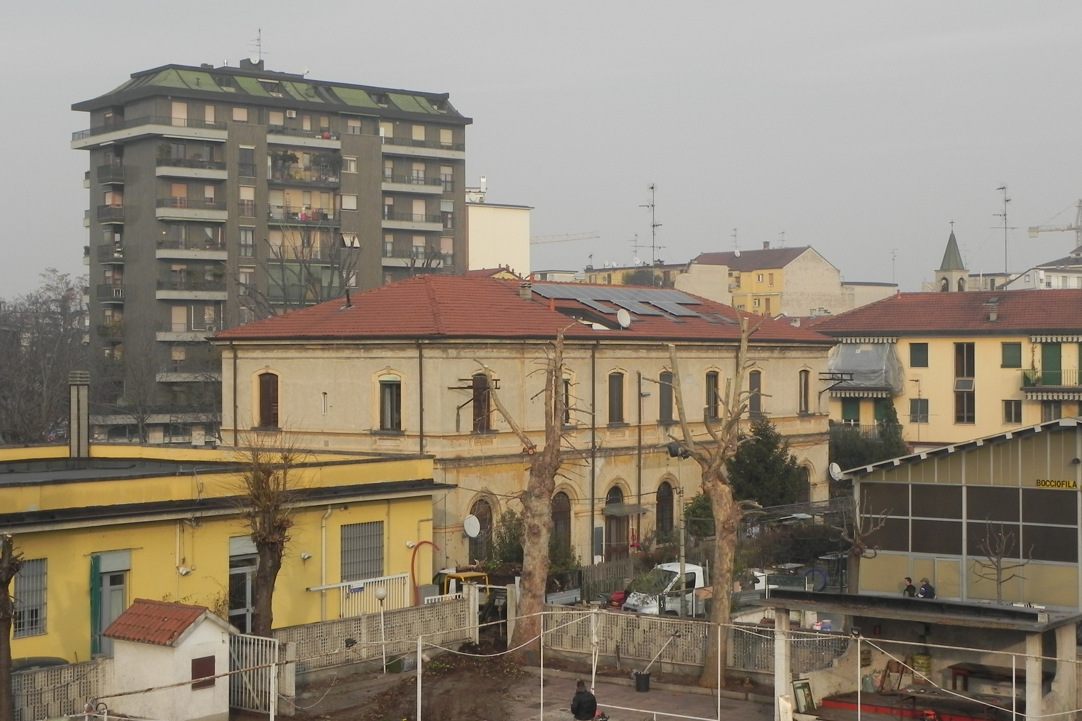 Il vecchio fabbricato viaggiatori della Stazione di Milano Lambrate (1873), all'Ortica (Milano).